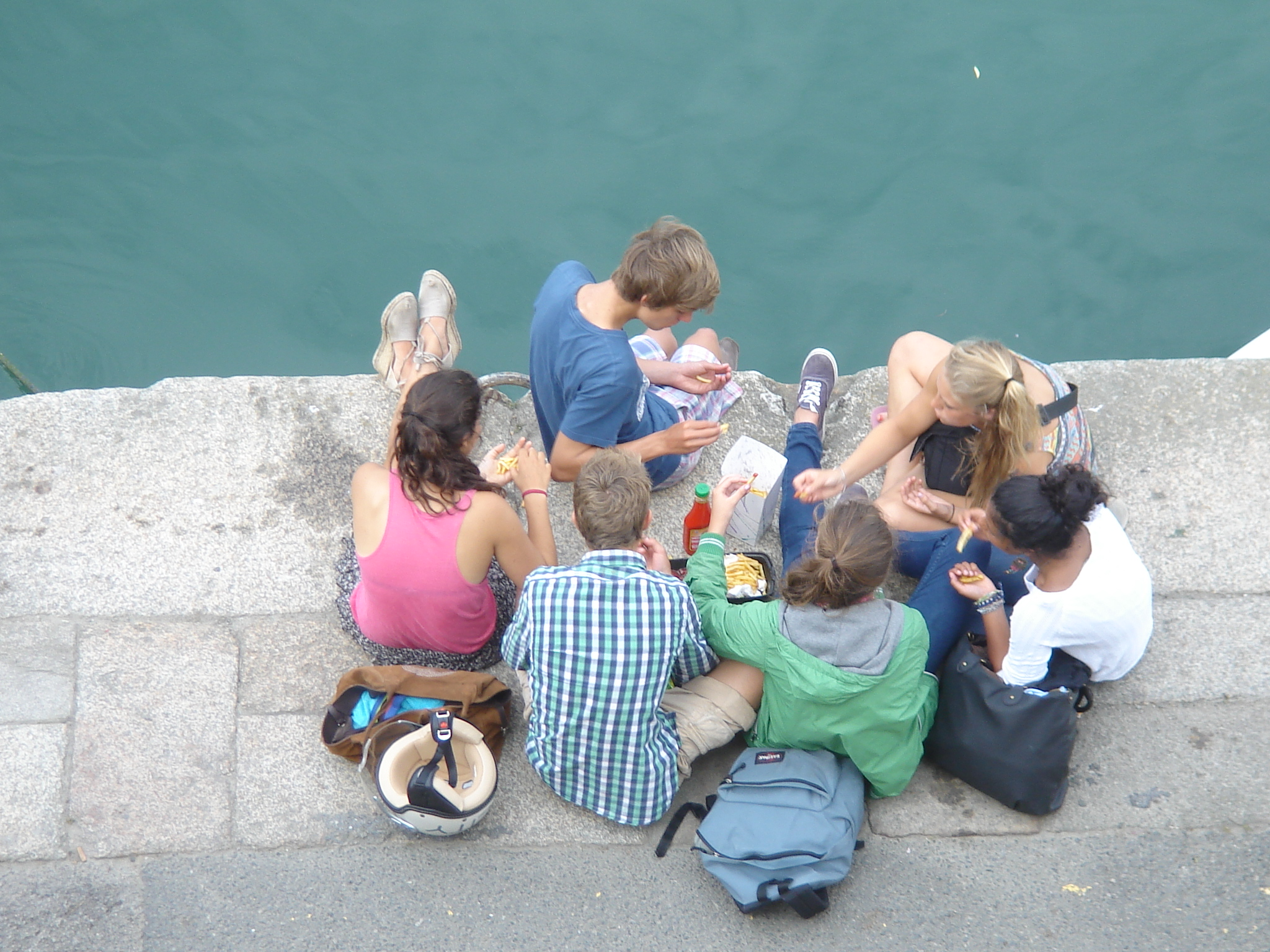 College students picnic on the harbor during the holidays